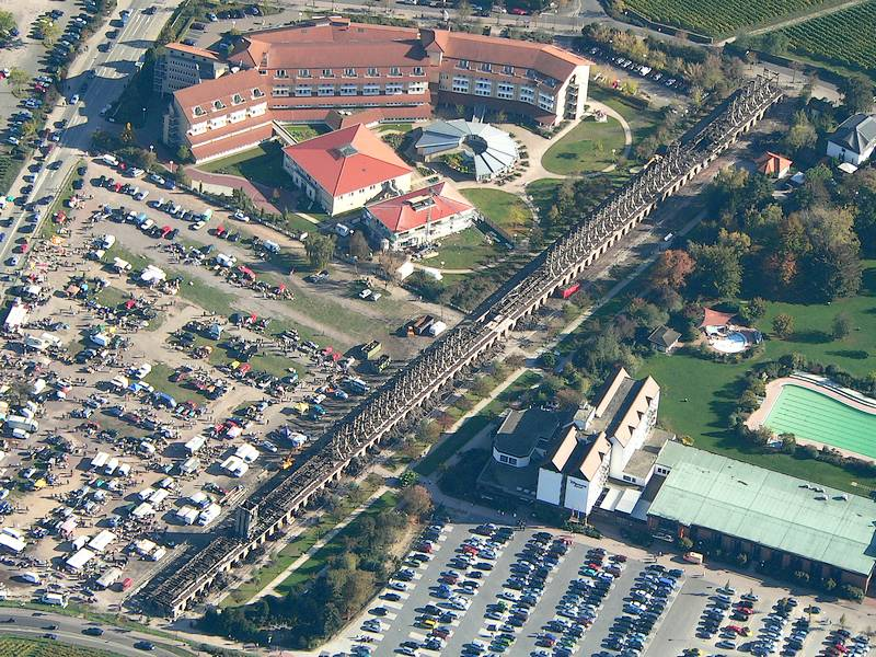 Luftaufnahme: Das abgebrannte Gradierwerk, Bad Dürkheim